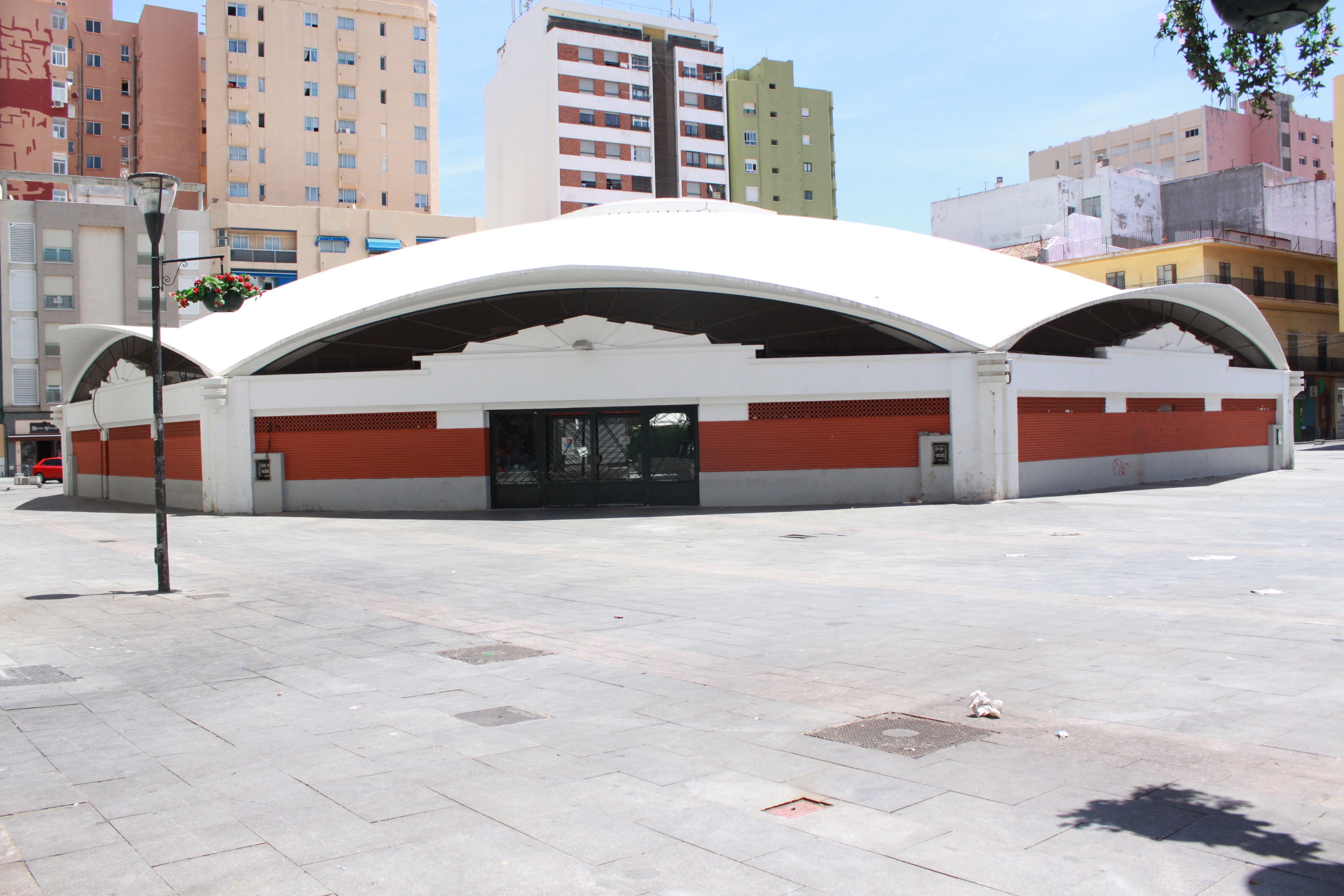 Mercado Ingeniero Torroja de Algeciras, Andalucía, España.